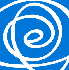 Etxepare Euskal Institutuko logoa